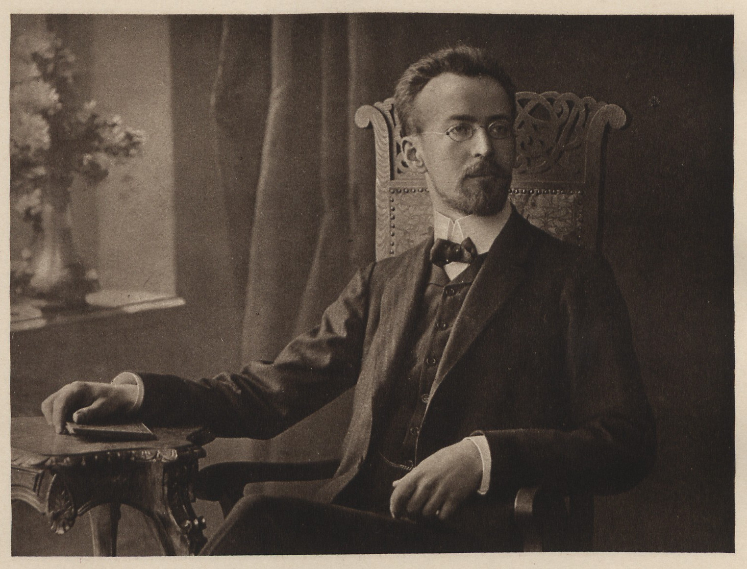 Mieczysław Karłowicz